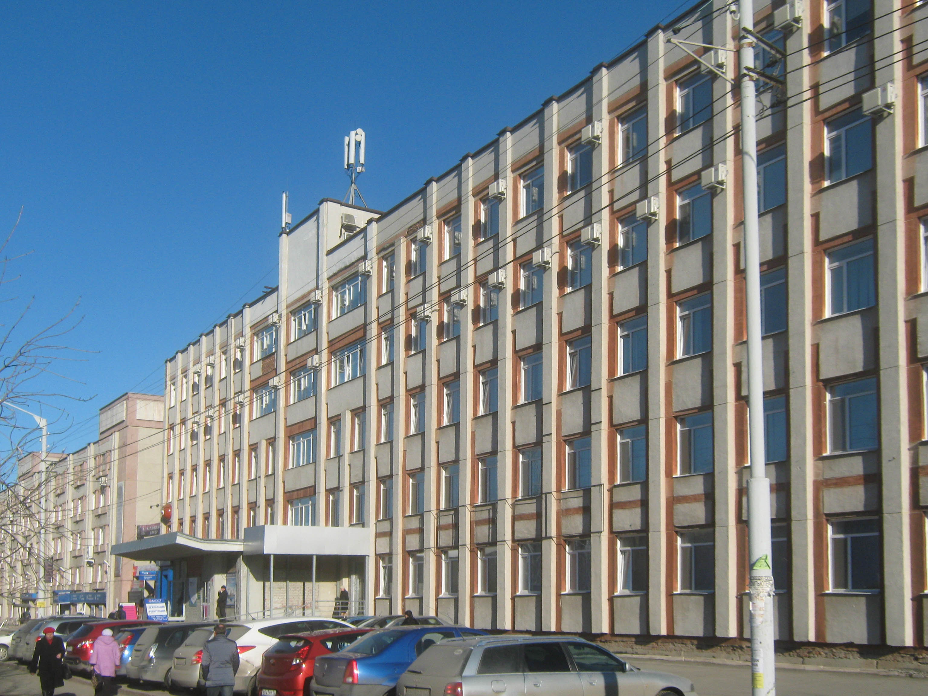 Нахимова 8, Томск